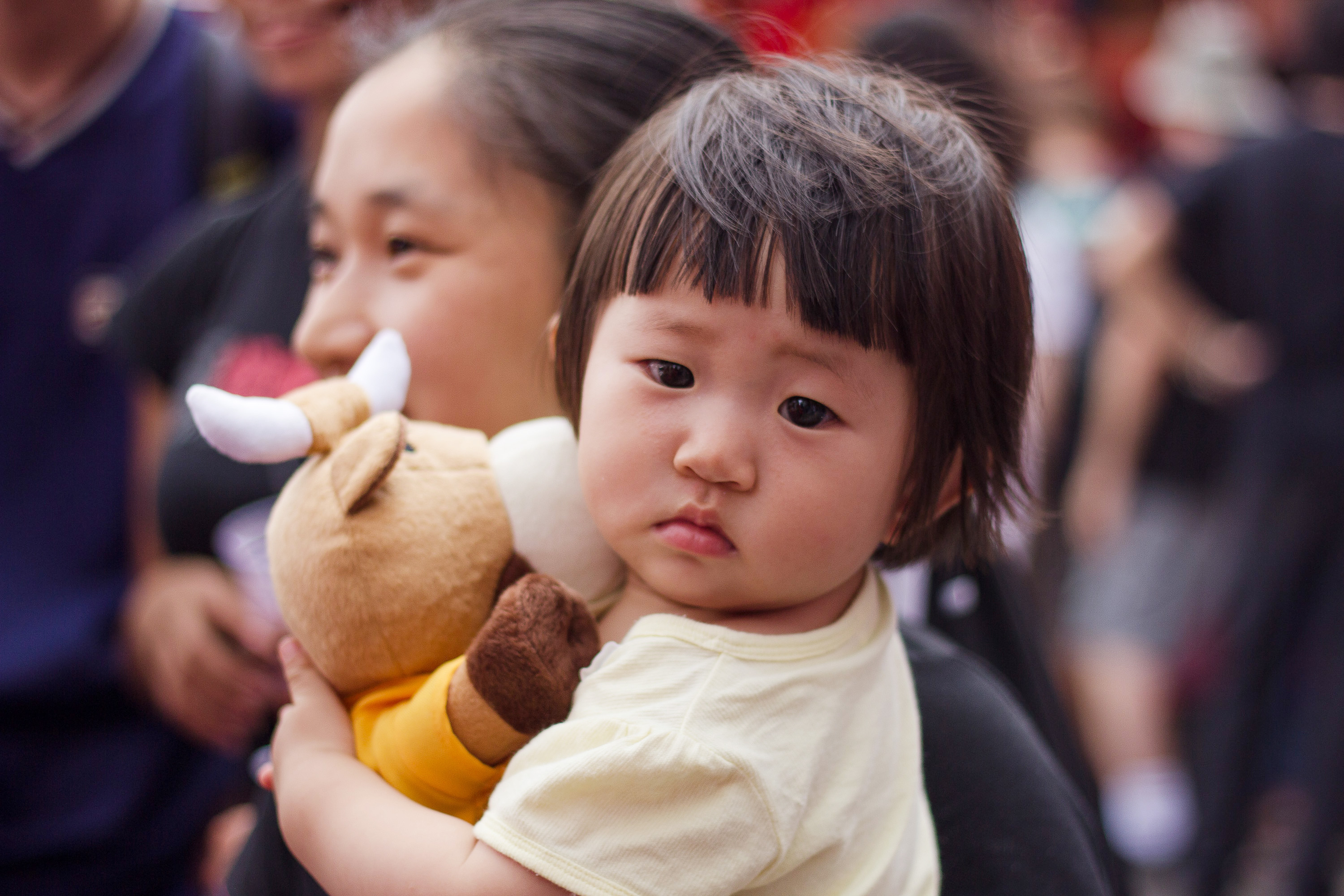 ANO NOVO CHINÊS - LIBERDADE - SÃO PAULO - 02/02/2013 - O ano novo chinês que é celebrado no bairro da Liberdade na região central da capital paulista, comemora sua 8ª edição no ano de 2013.